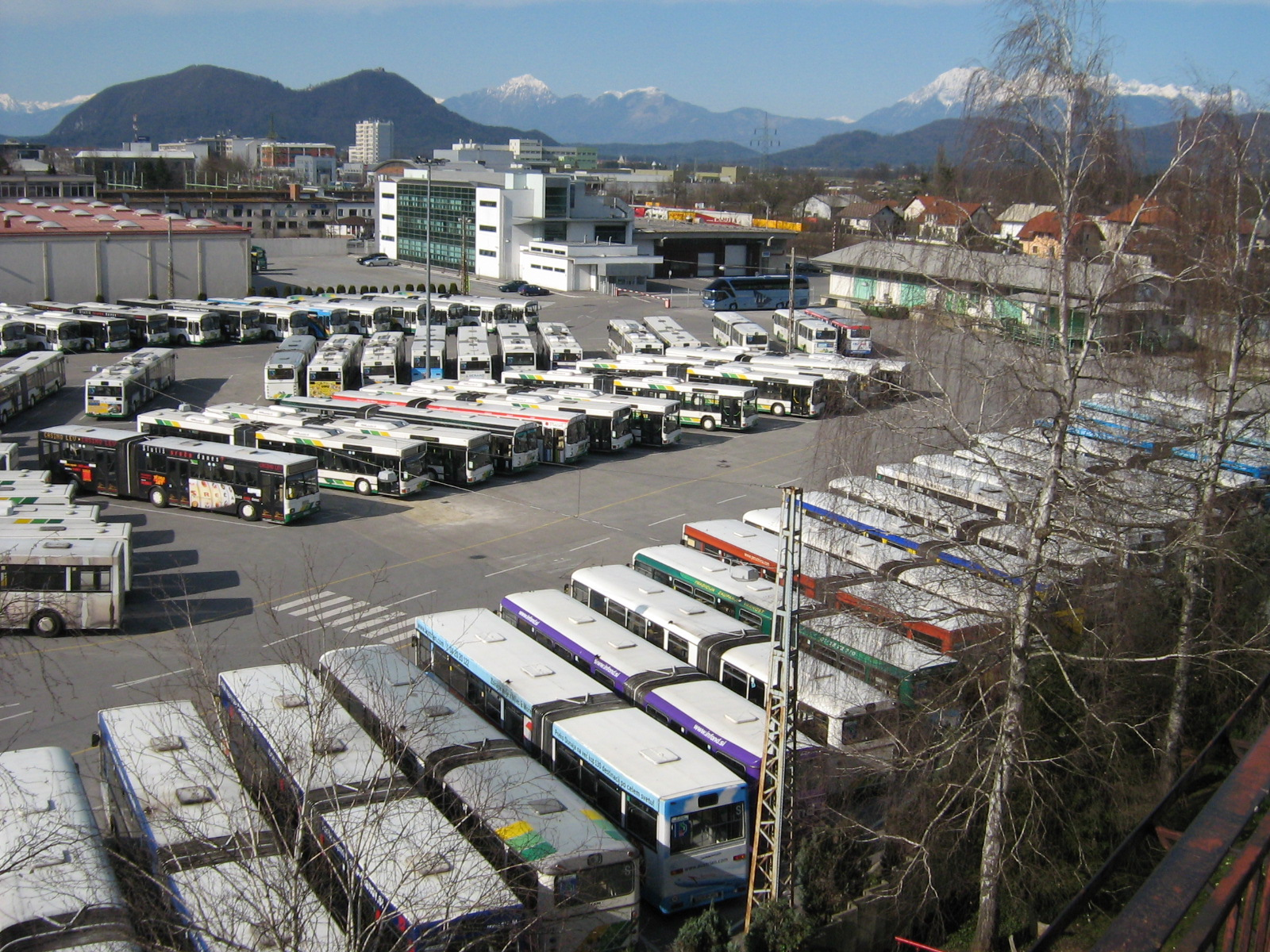 Večji del parkirišča Ljubljanskega potniškega prometa ob ulici Ljubljanske brigade. Avtor: Uporabnik:BurekBuster